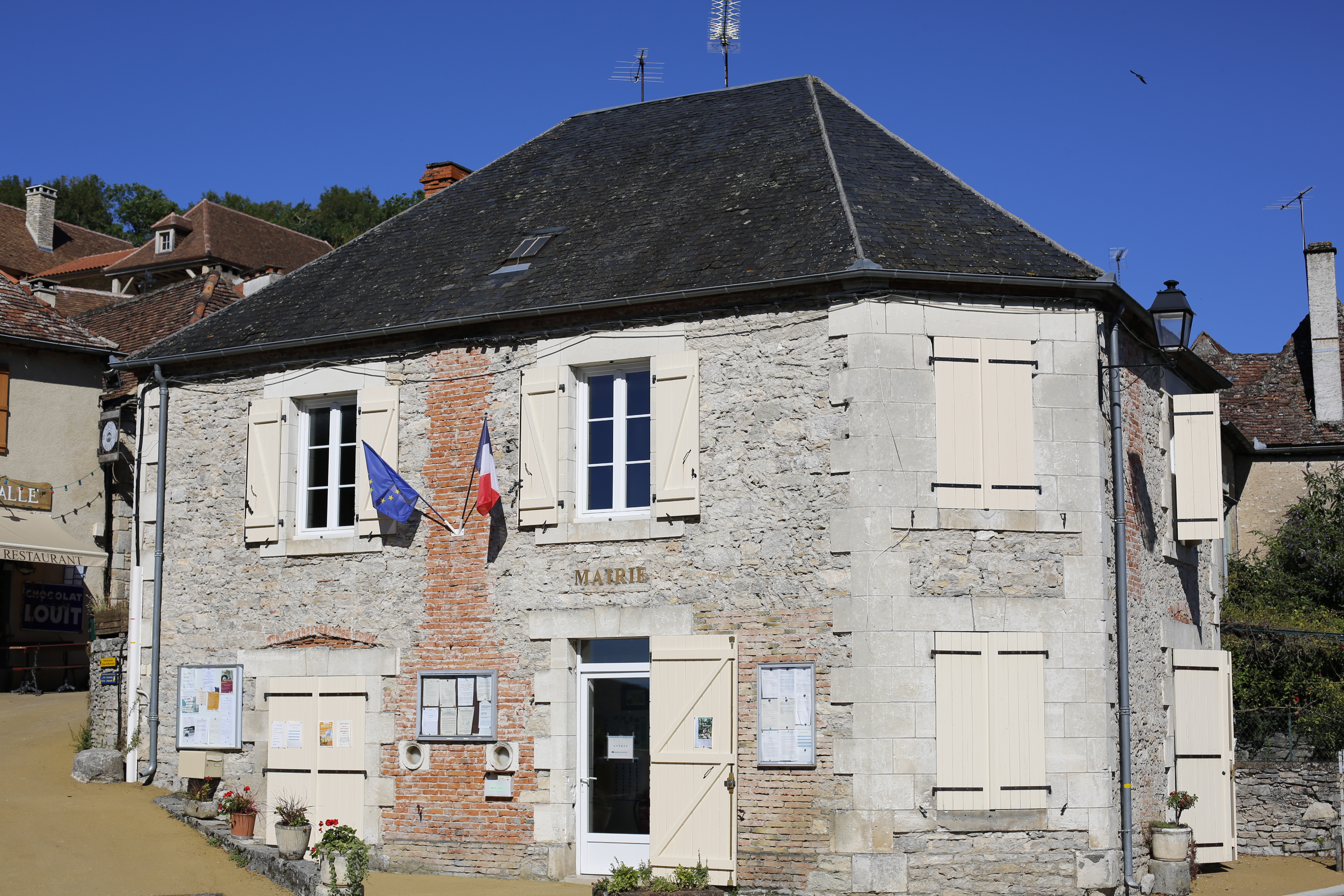 Mairie de Montvalent.